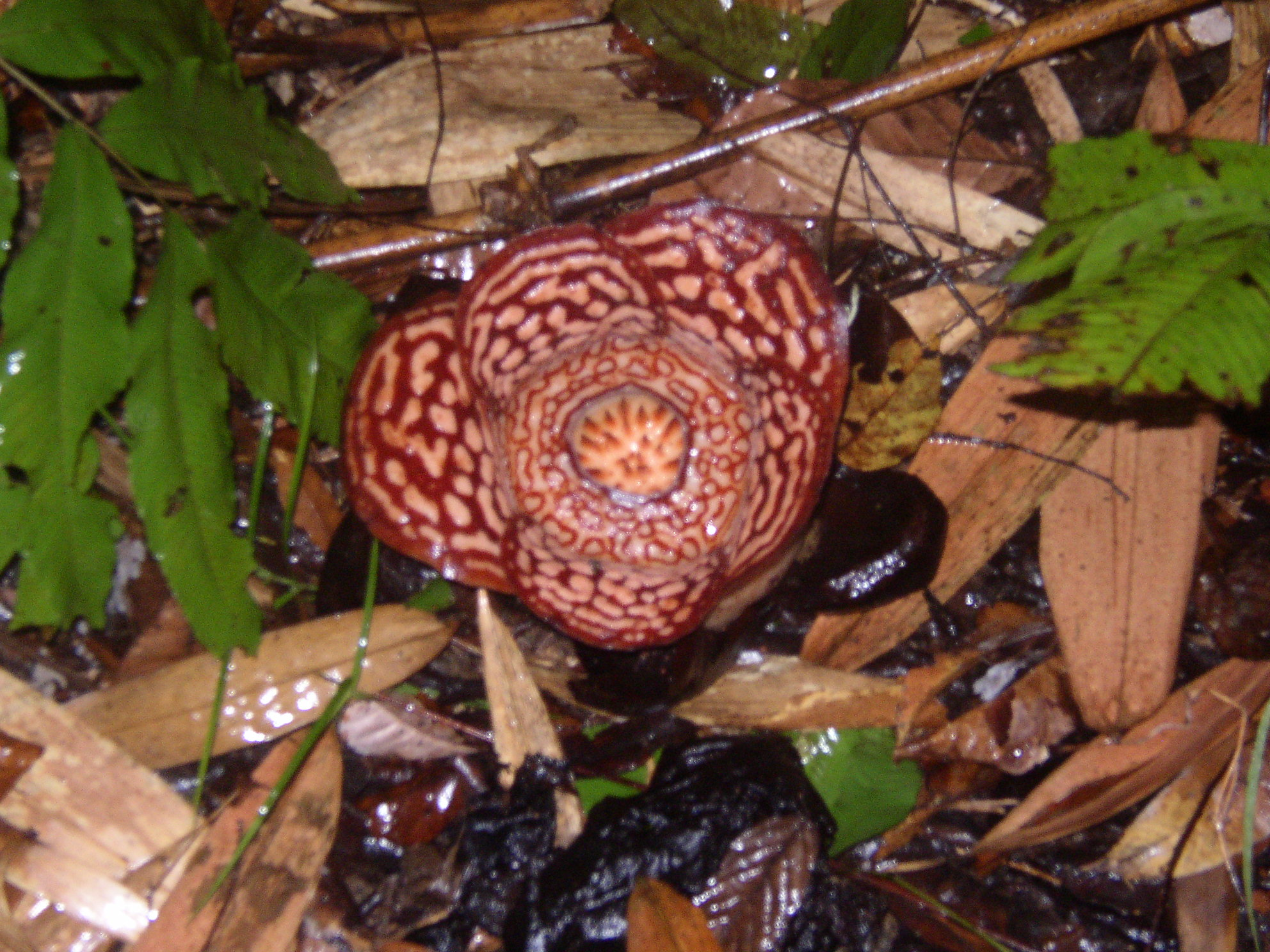 Rafflesia pricei near Mount Kinabalu, Borneo.